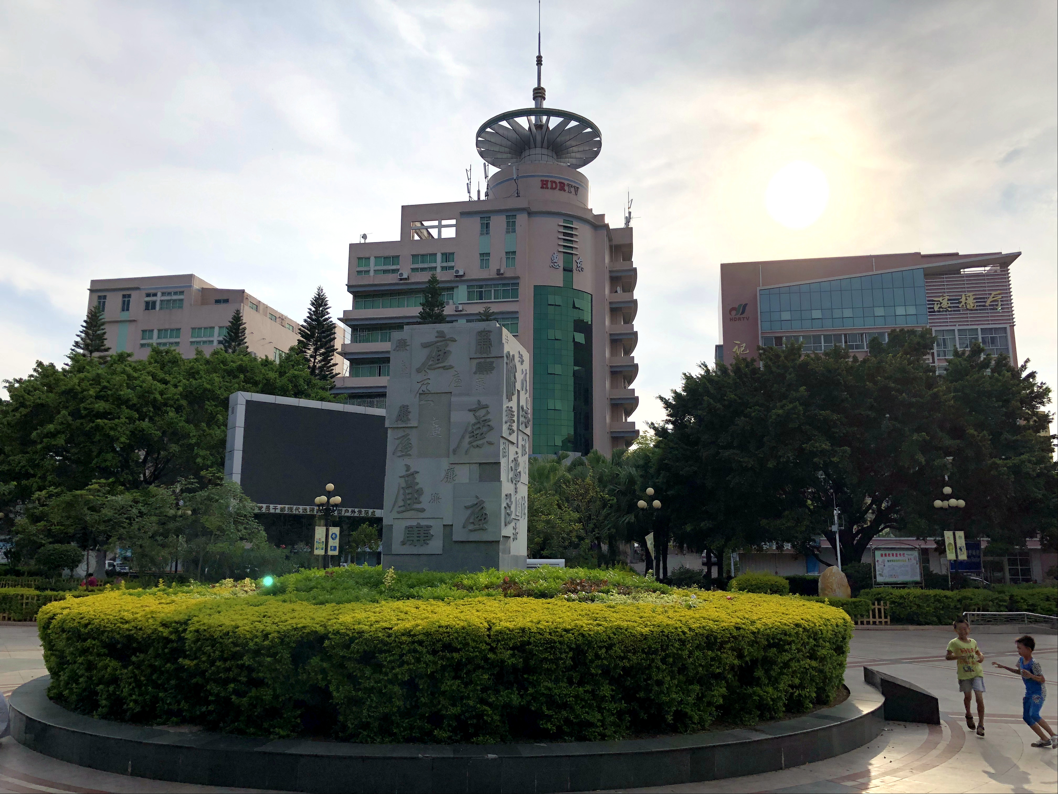 中文（中国大陆）: 惠东县文化广场